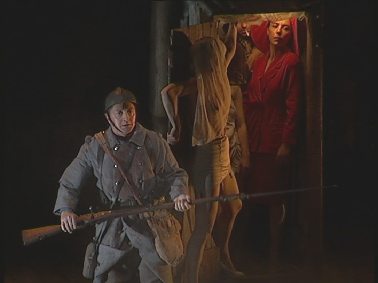 Internationale Kulturtage der Stadt Dortmund 2000, Théatre de la Mezzanine